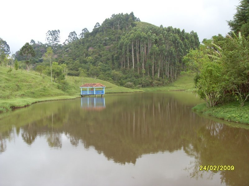 Típico batelão em uma lagoa